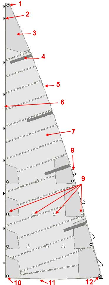 description : schéma grand-voile gréement bermudien auteur : réalisation Pline